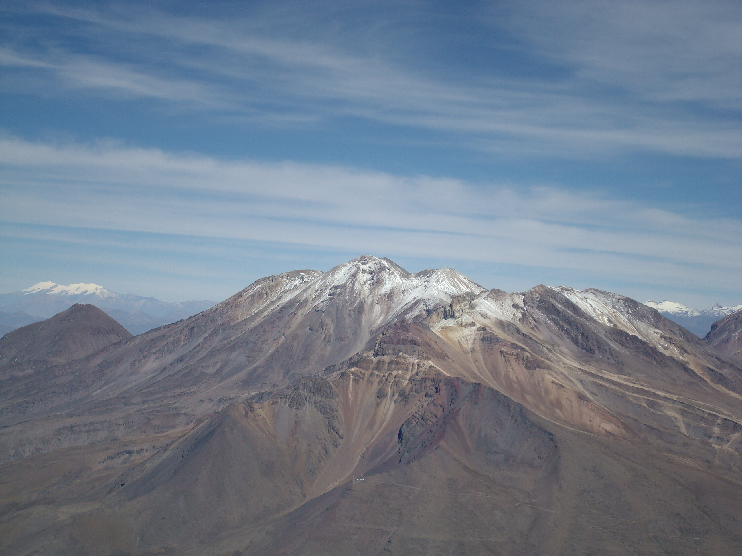 Fotos del viaje al Misti